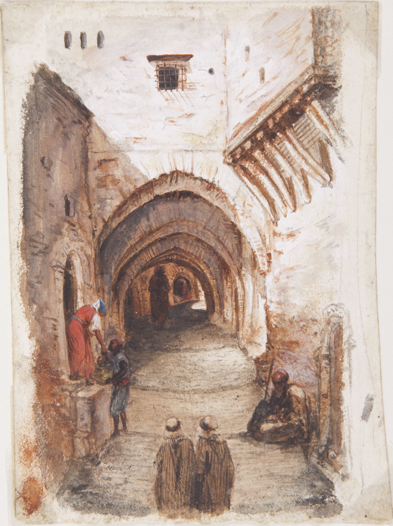 Maison à arcades en Afrique, par D. Musel. Gouache sur papier. Hauteur de la feuille en mm 135 ; Largeur de la feuille en mm 100. Numéro d'inventaire : Bx M 1482. Historique : Ancienne collection BONIE (364). Mode d'acquisition Legs Bonie, 1895. (Musée des Beaux-Arts - Mairie de Bordeaux. Cliché DAVID, Florian).